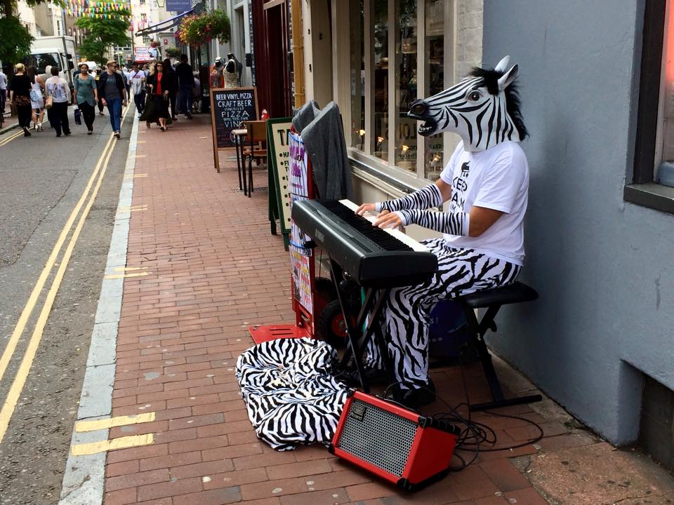 V turisticky zajímavém letovisku Brighton se mnoho obyvatel zaměřuje na služby spojené s turistickým ruchem a zábavou, město má status spravedlivého obchodu Fairtrade City. Spravedlivý obchod je institucionální uspořádání, jehož cílem je pomoci producentům dosáhnout lepších obchodních podmínek